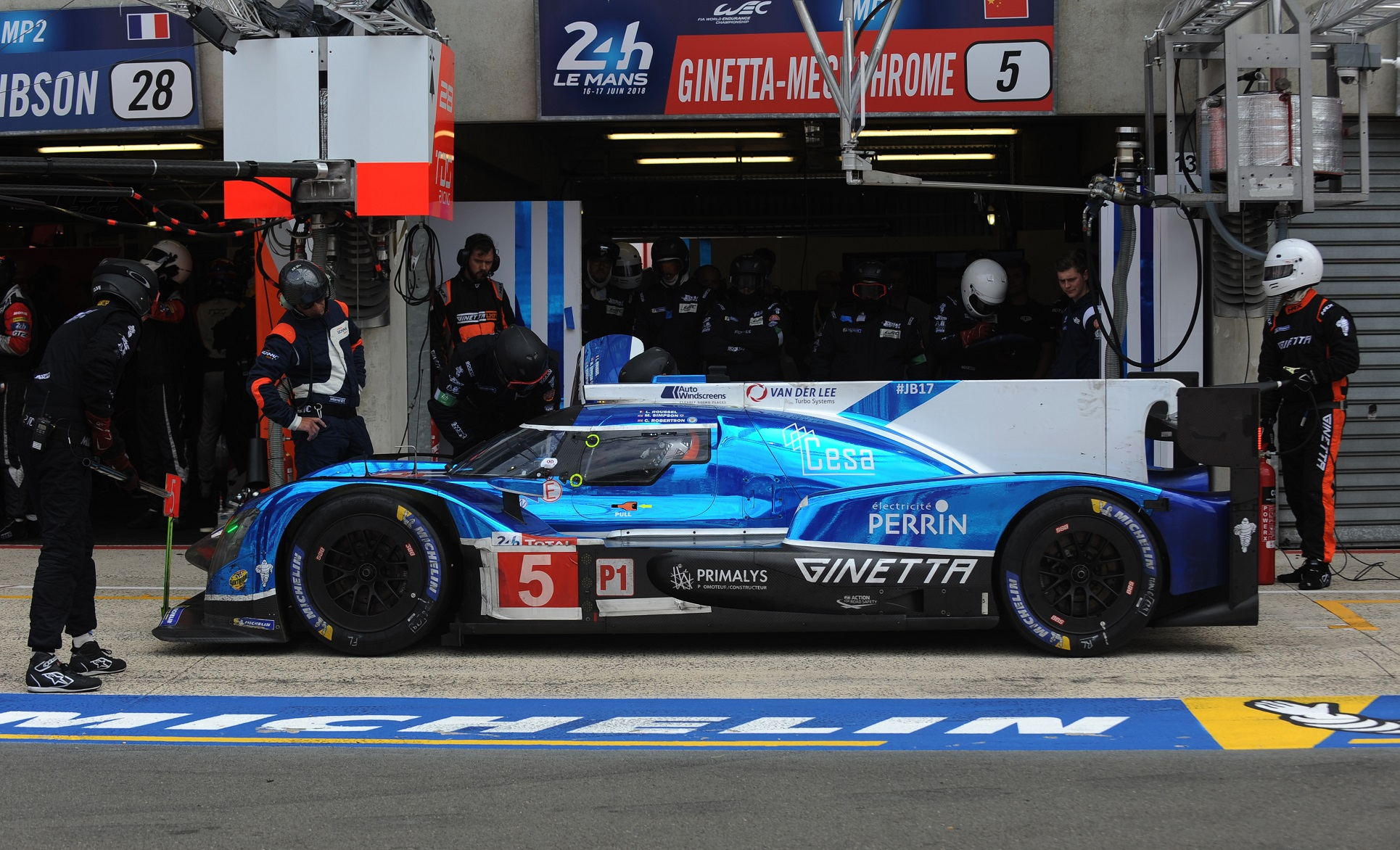 Ginetta G60LTP1 LeMans 2018